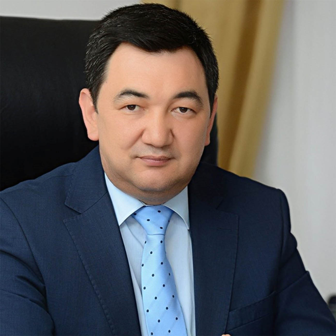 Монгол: Олон улсын Түрэг академийн Ерөнхийлөгч